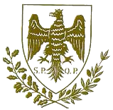 Stemma di Palermo in uso dal 1891 al 1991, disegnato da Giuseppe Damiani Almeyda.